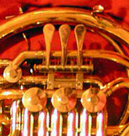 Descrição: Detalhe das válvulas (pistos) de um flugelhorn. Detail of the valves of a flugellhorn. Fonte e créditos Detalhe extraído de/Detail extracted from: de Martin Steiger carregada originalmente em 14-mar-2004 por John Doe. Imagem alterada e carregada por cralize 14:03, 21 January 2006 (UTC)